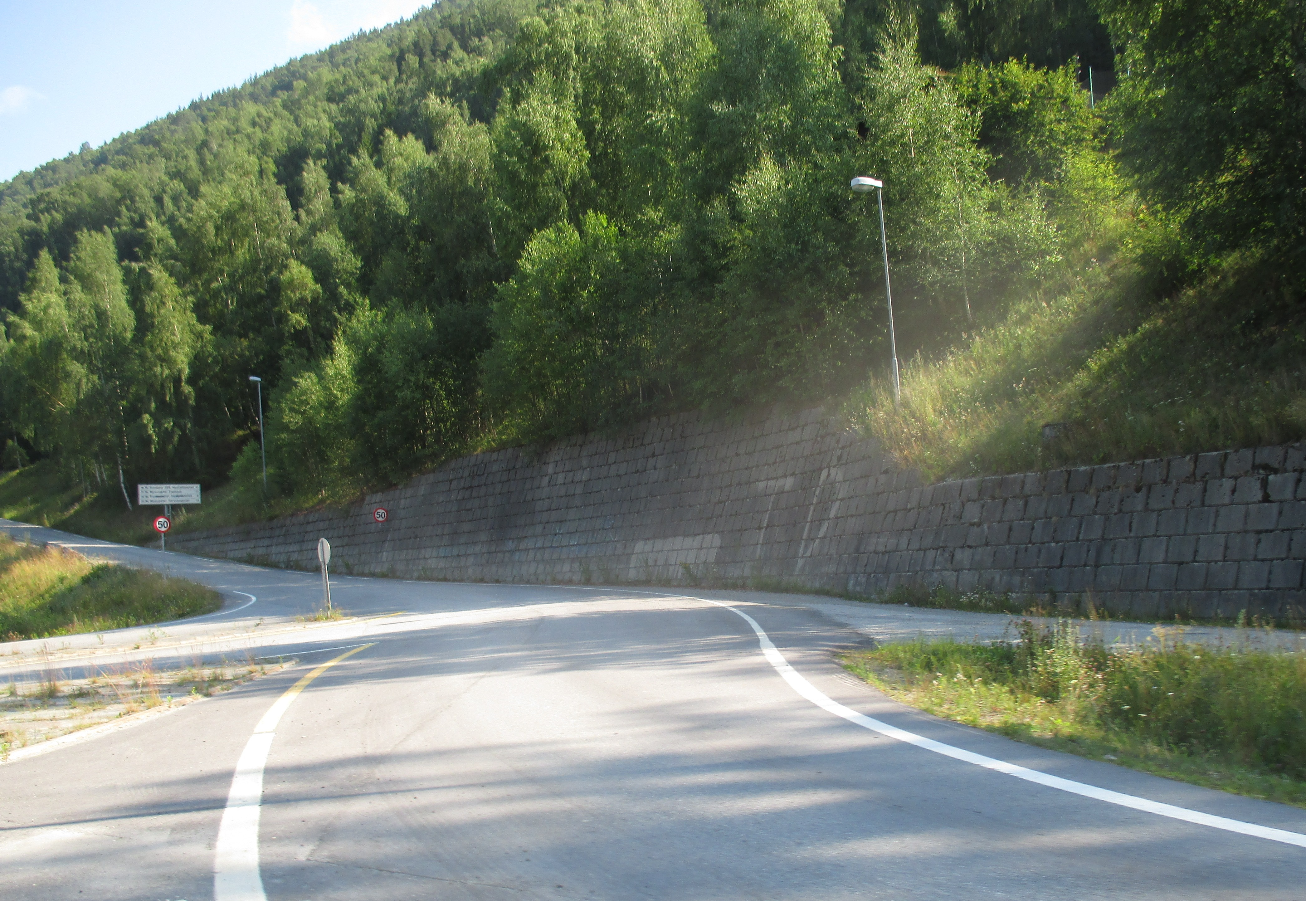 Rondanevegen (fylkesvei 444) tar av fra E6 ved Otta.